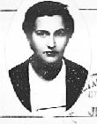 Petra Barnés González, farmacéutica pionera del s.XX en España. Exiliada política. Foto de la ficha del documento de migración expedido por el gobierno mexicano y publicado en webs del Estado Español